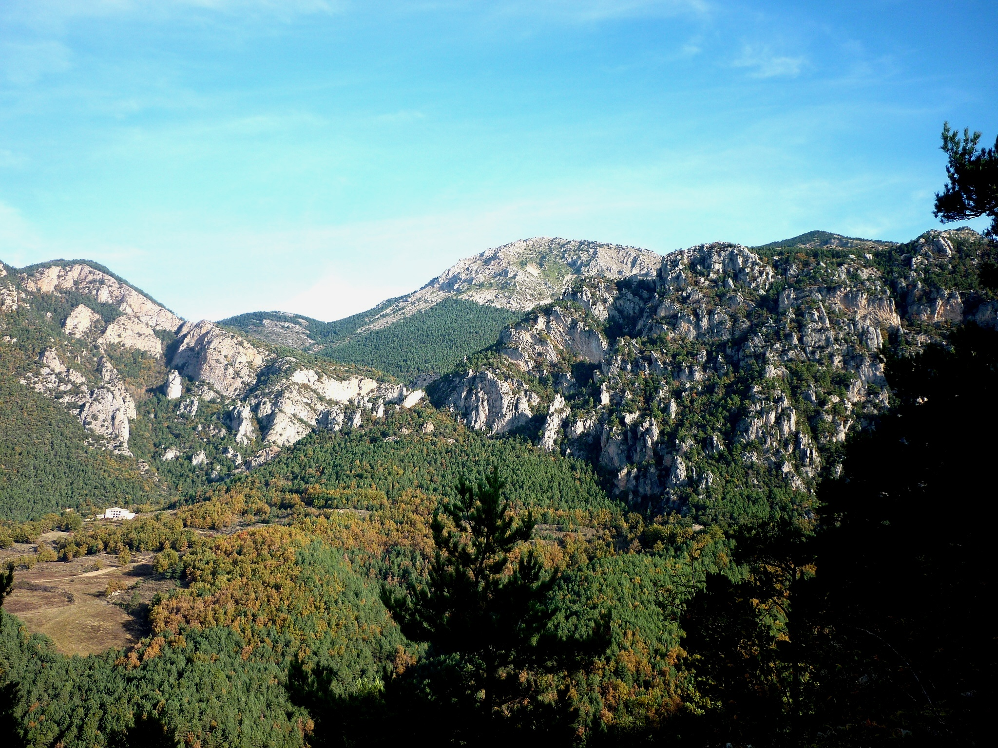 Panoràmica de la Ribereta del Pujol, amb les Roques del Minguell a la dreta. La Coma i la Pedra (Solsonès - Catalunya)